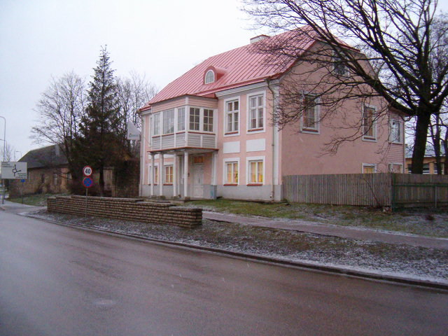 Sprincktali suvemõisa peahoone. Tondi 17a. Tallinn.